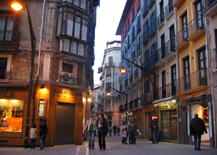 imagen del Casco Antiguo de Pamplona